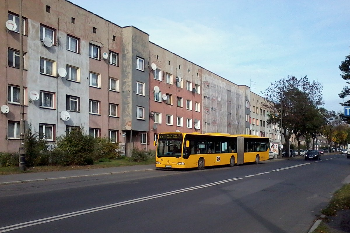 Autobus Mercedes O530G PKM Gliwice jadący w strone Łabęd. Zdjęcie zrobione na ulice Roosevelta w Zabrzu, przed budynkiem numer 57-63.